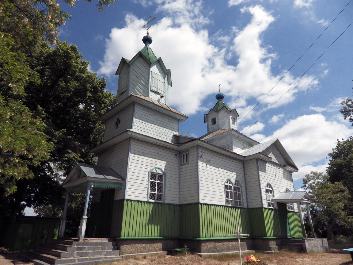 Церква Марії Магдалини, Харитонівка, вул. 8 Березня